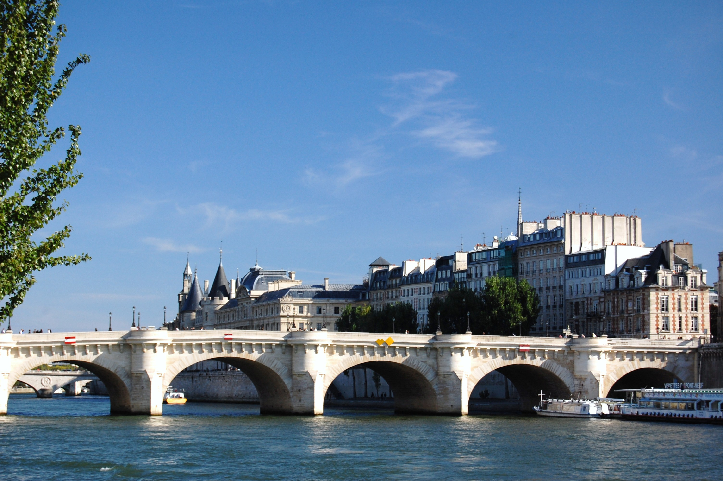 Pont Neuf Seine Paris